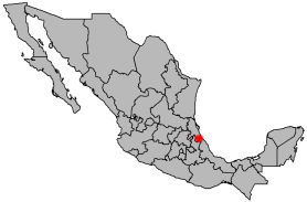 Location of Poza Rica de Hidalgo, Veracruz, Mexico